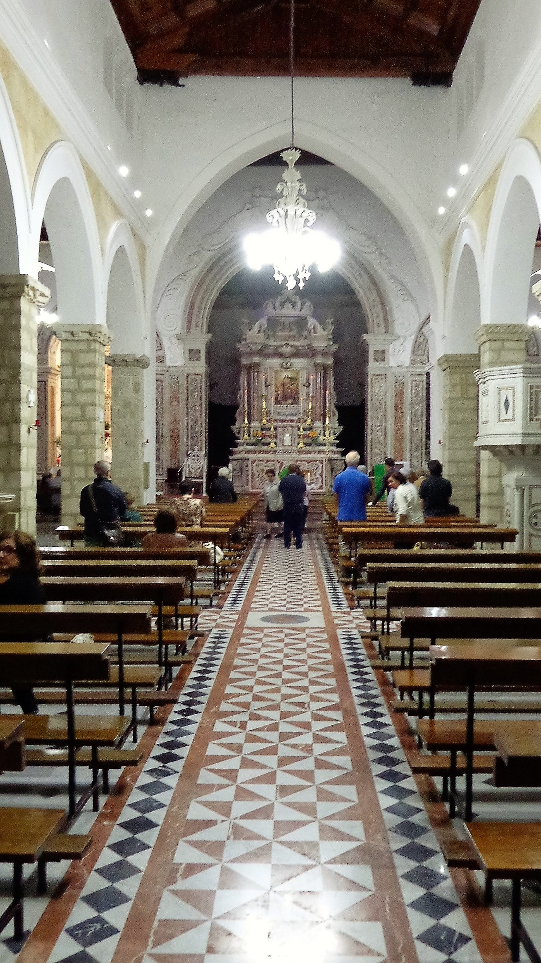 Navata